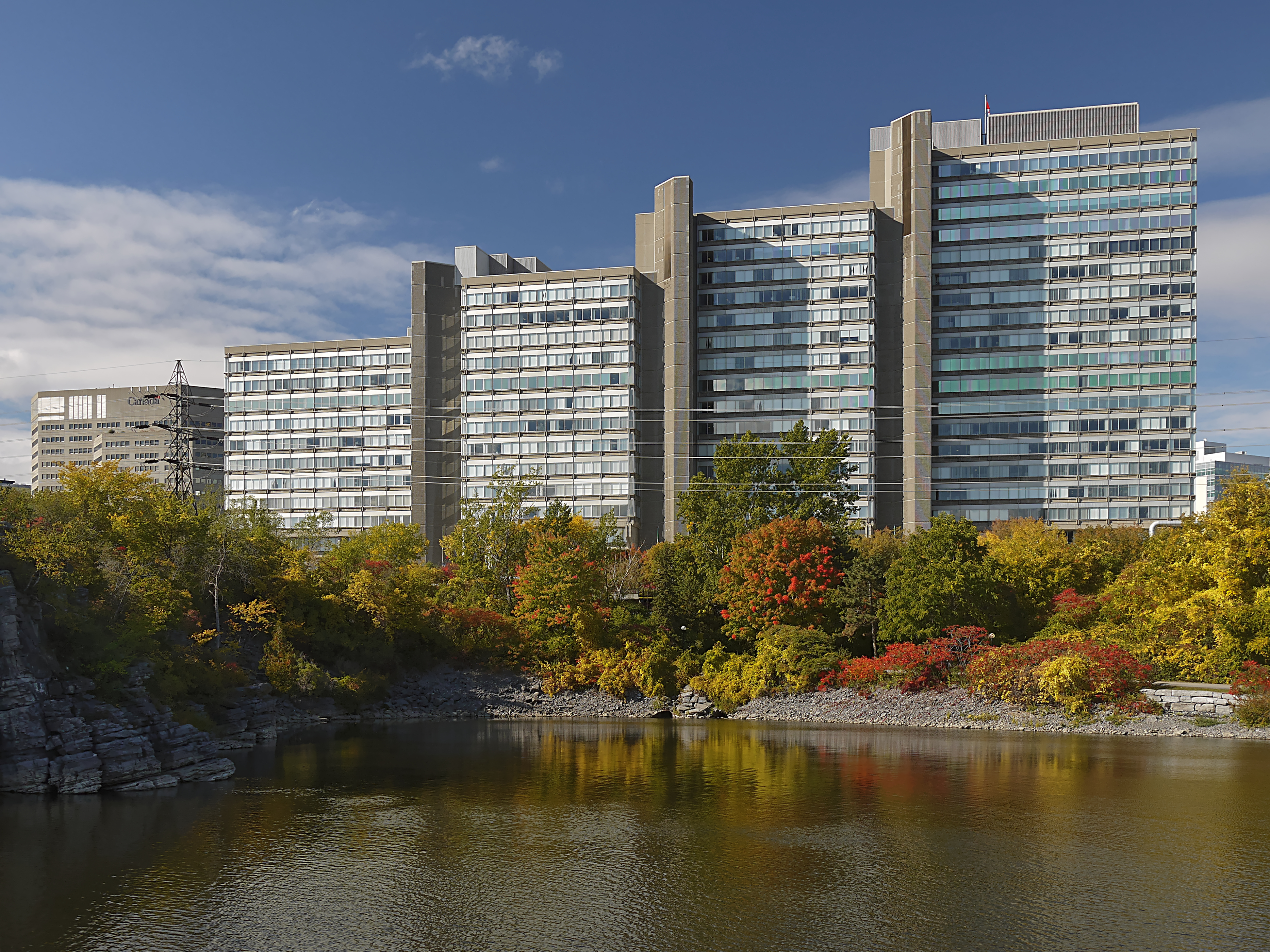 Portage III